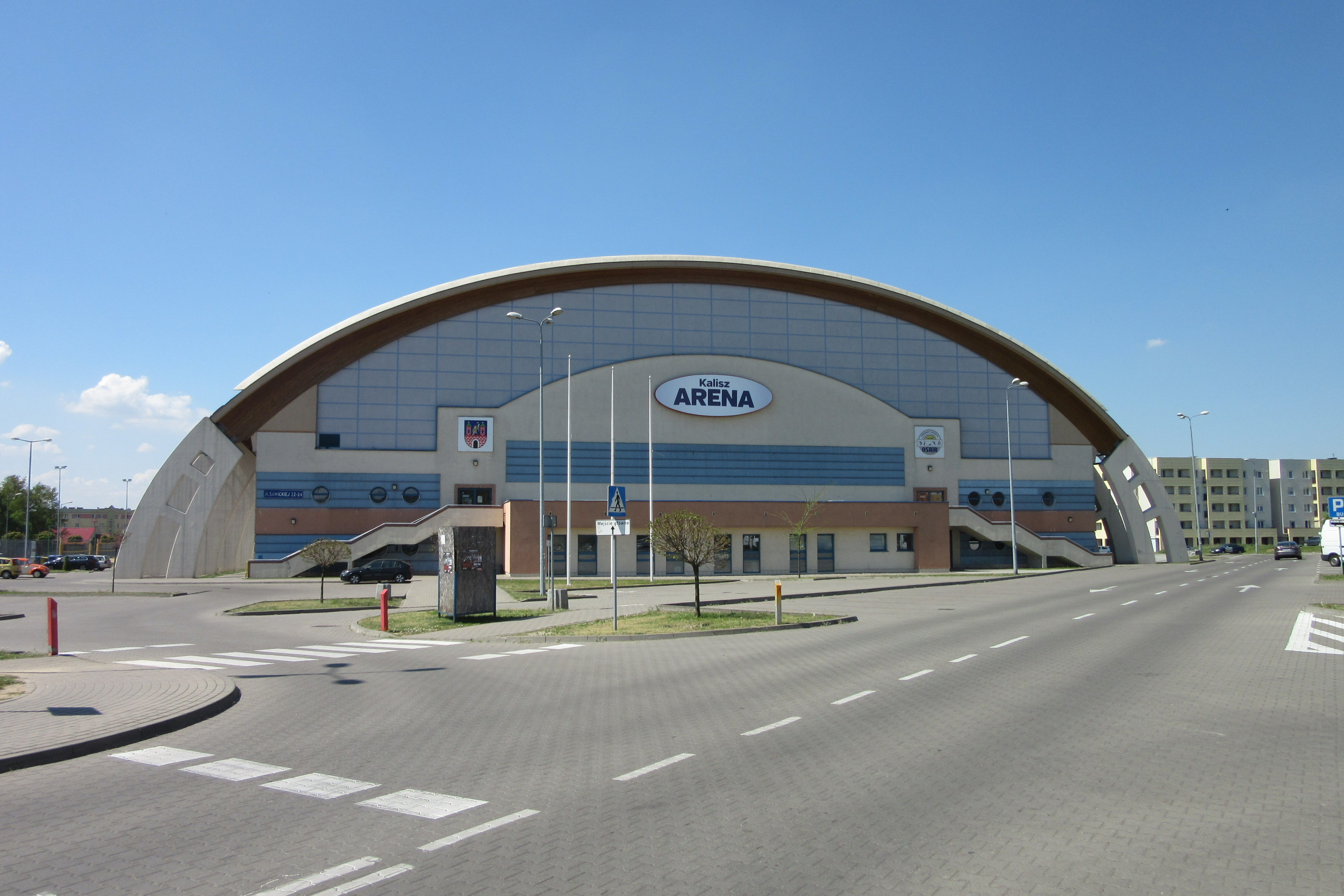 Hala Kalisz Arena